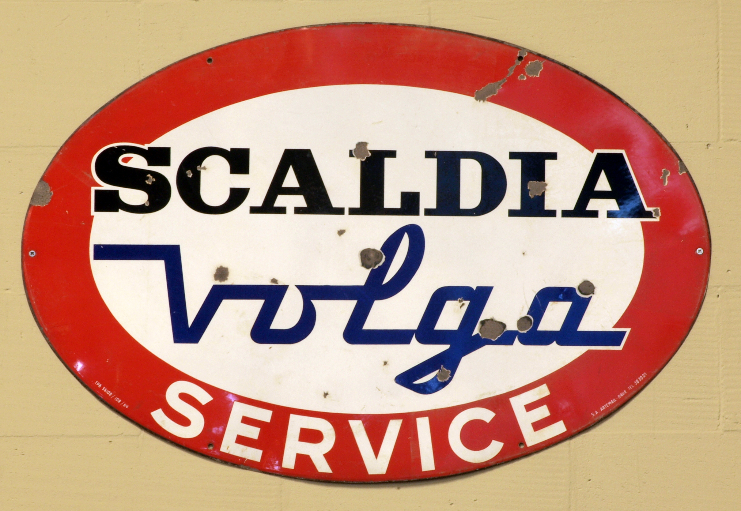 Den Hartogh Ford Museum.